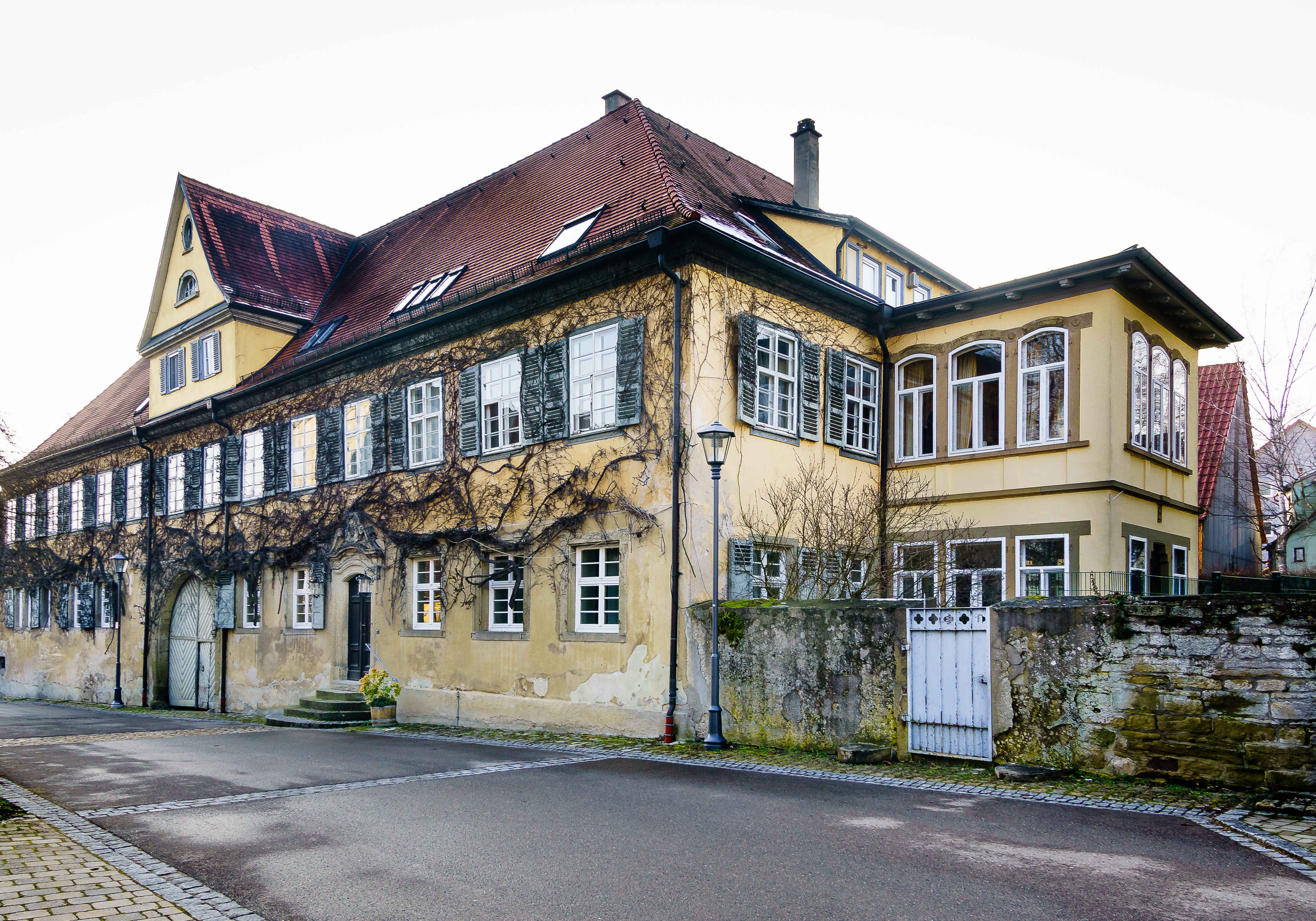 Schloss Gärtringen im Landkreis Böblingen, Baden-Württemberg